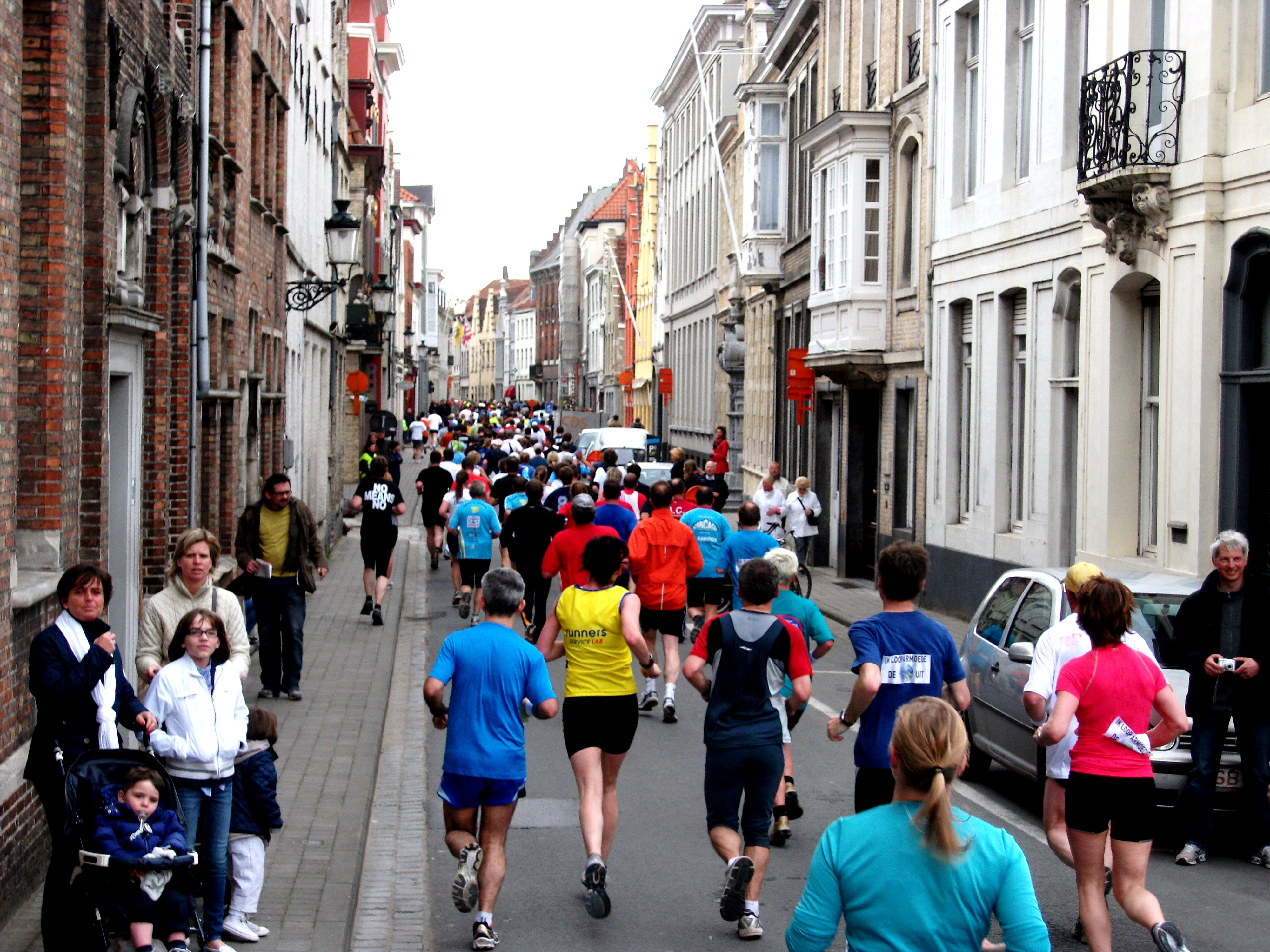 Een foto genomen tijdens de dertigste editie van 'Dwars door Brugge' op 9 mei 2010.